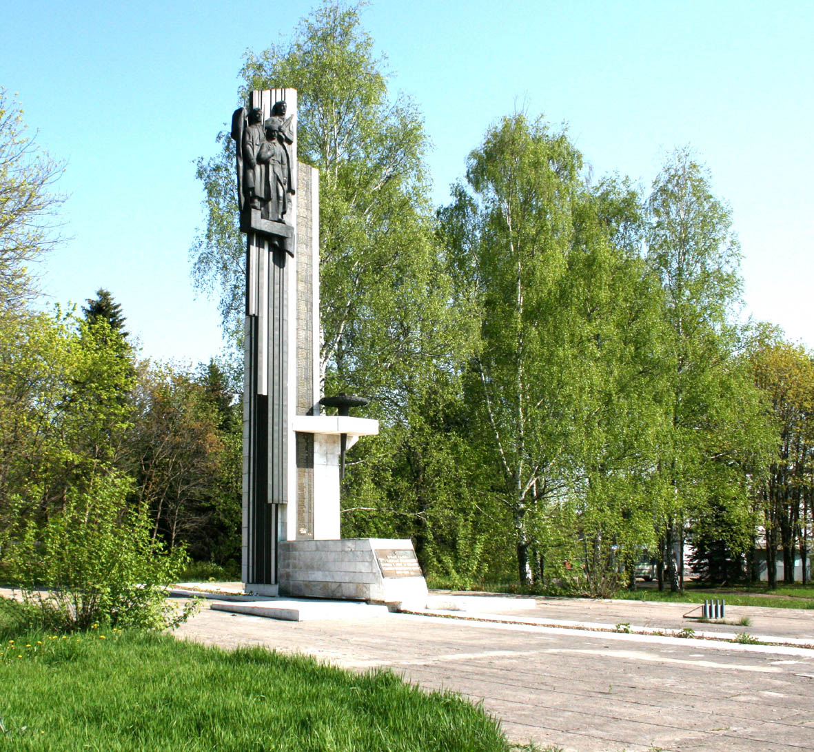 Общий вид стелы Памяти павших в НПО ИСТОК